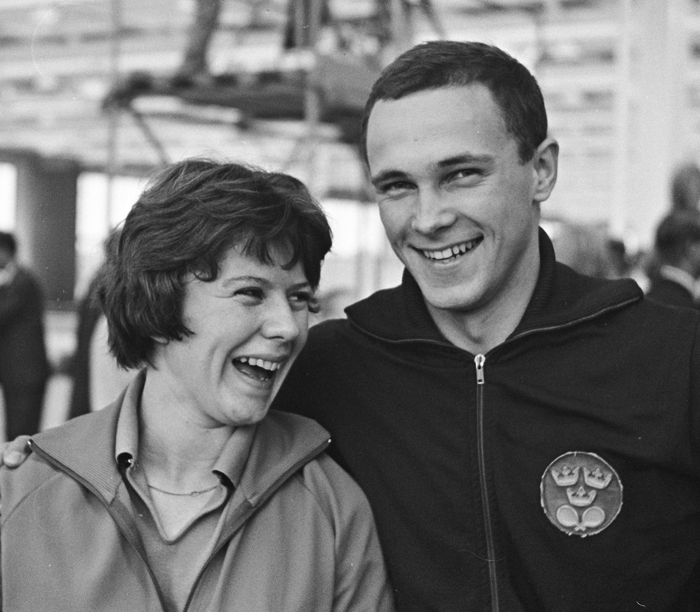 Tafeltenniskampioenschappen in Utrecht. Internationaal toernooi mejuffrouw Shannon (Engeland) en Alcer (Zweden)